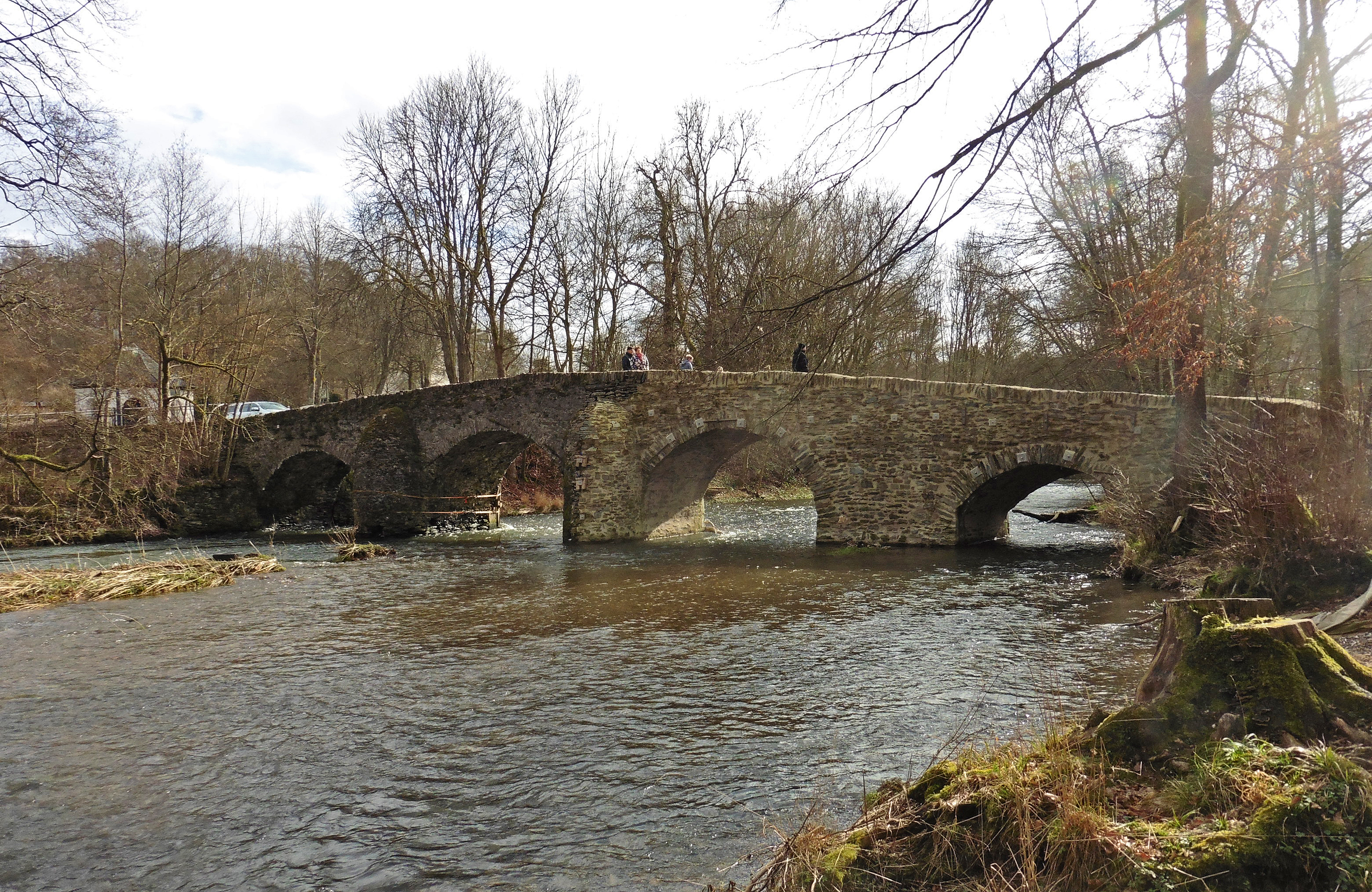 Historische Nisterbrücke westlich des Klosters Marienstatt. Ansicht von Nordwesten.